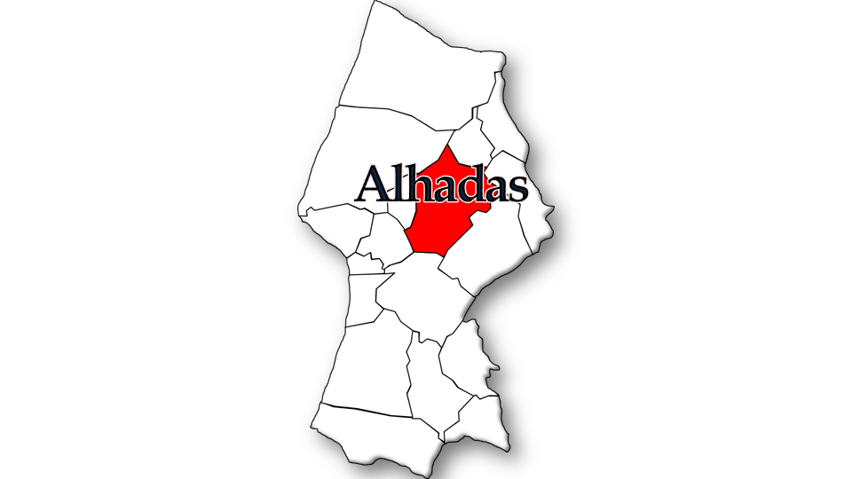 População